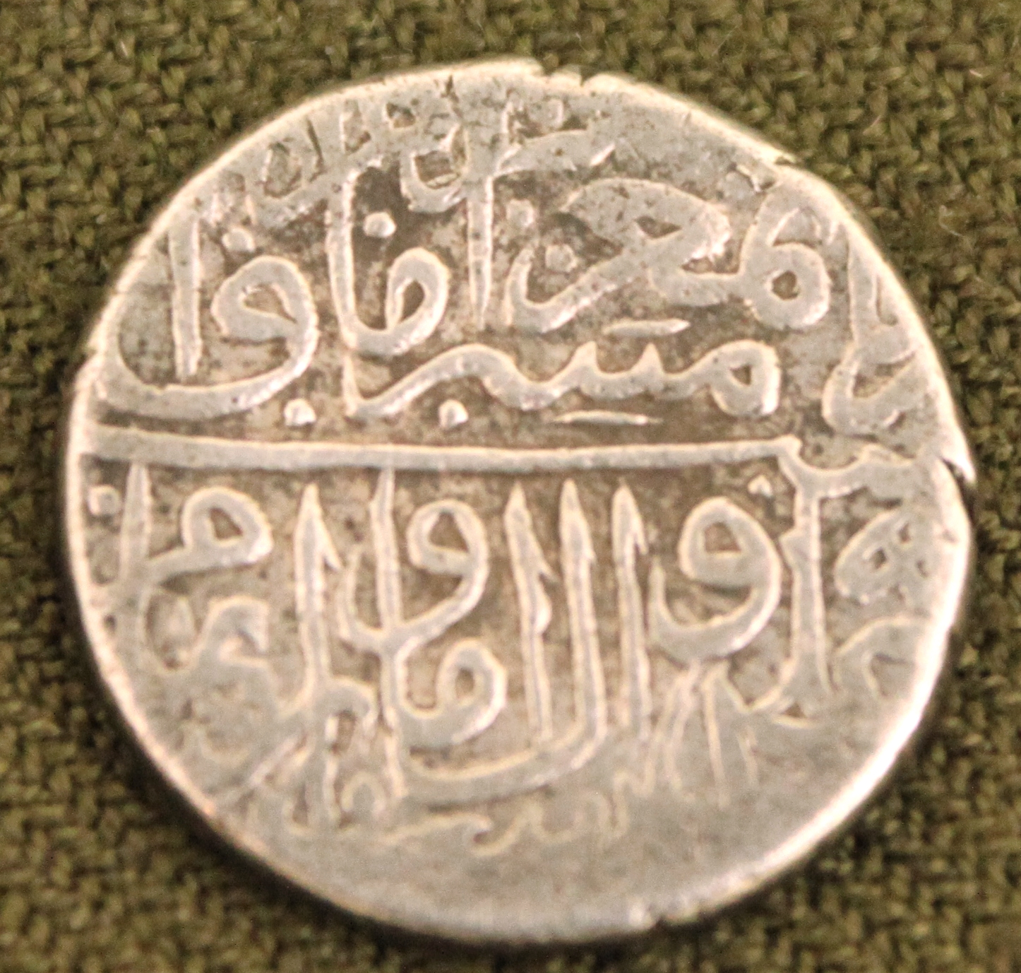 Сефевиды шах Исмаил II серебряная монета 1576.